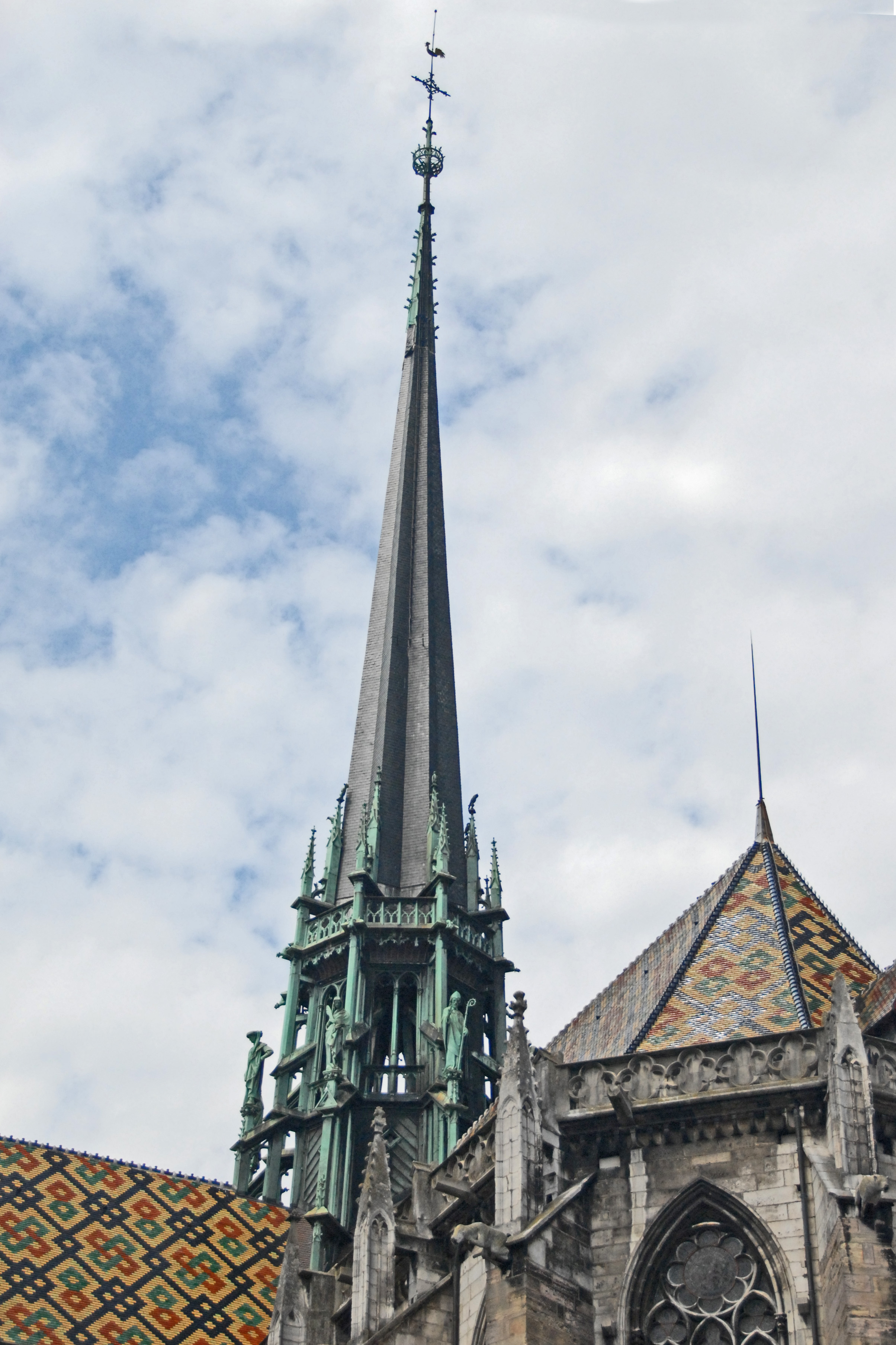 St-Bénigne, Vierungsturm von SO